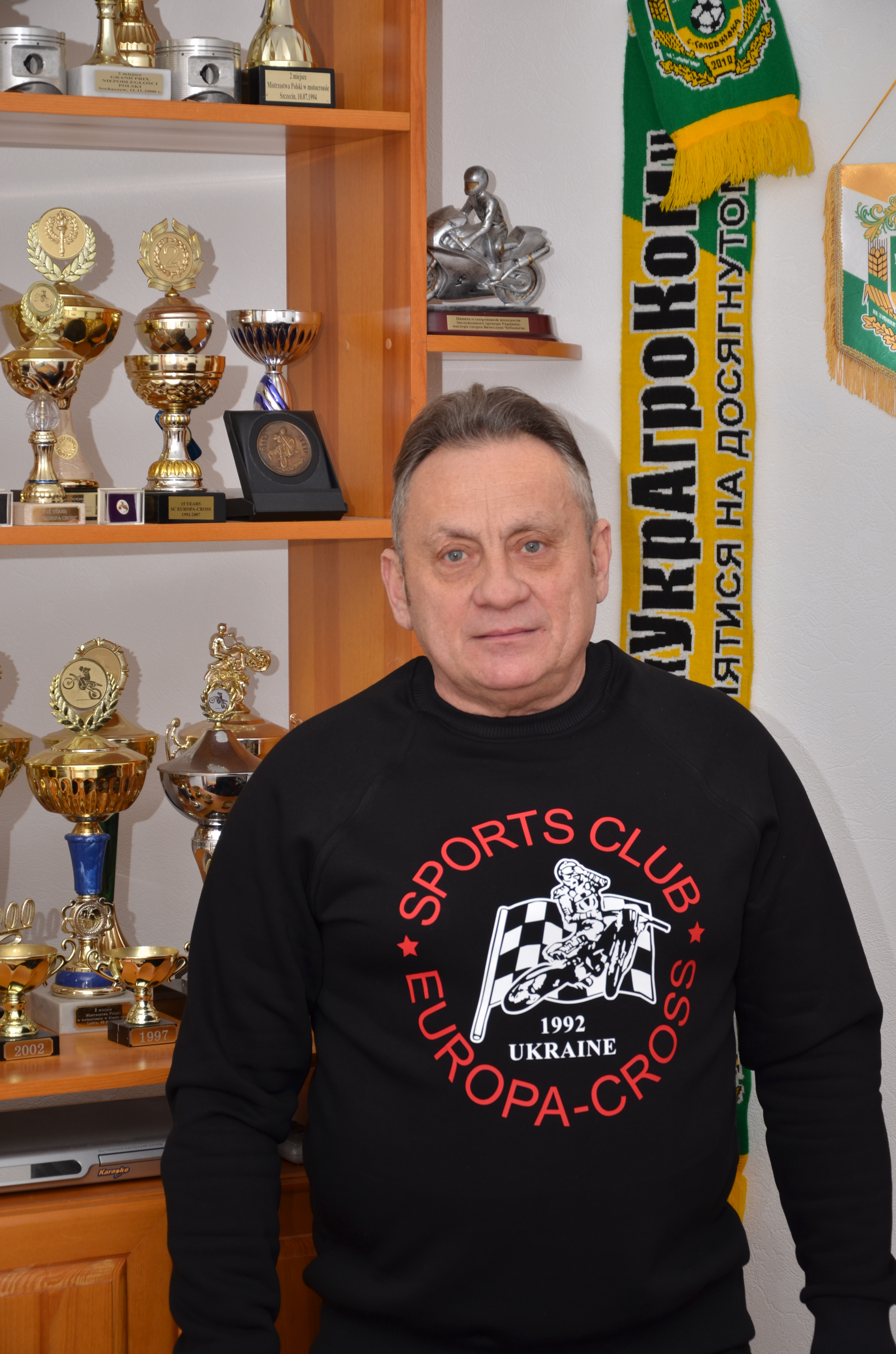 Chebyshev Vyacheslav